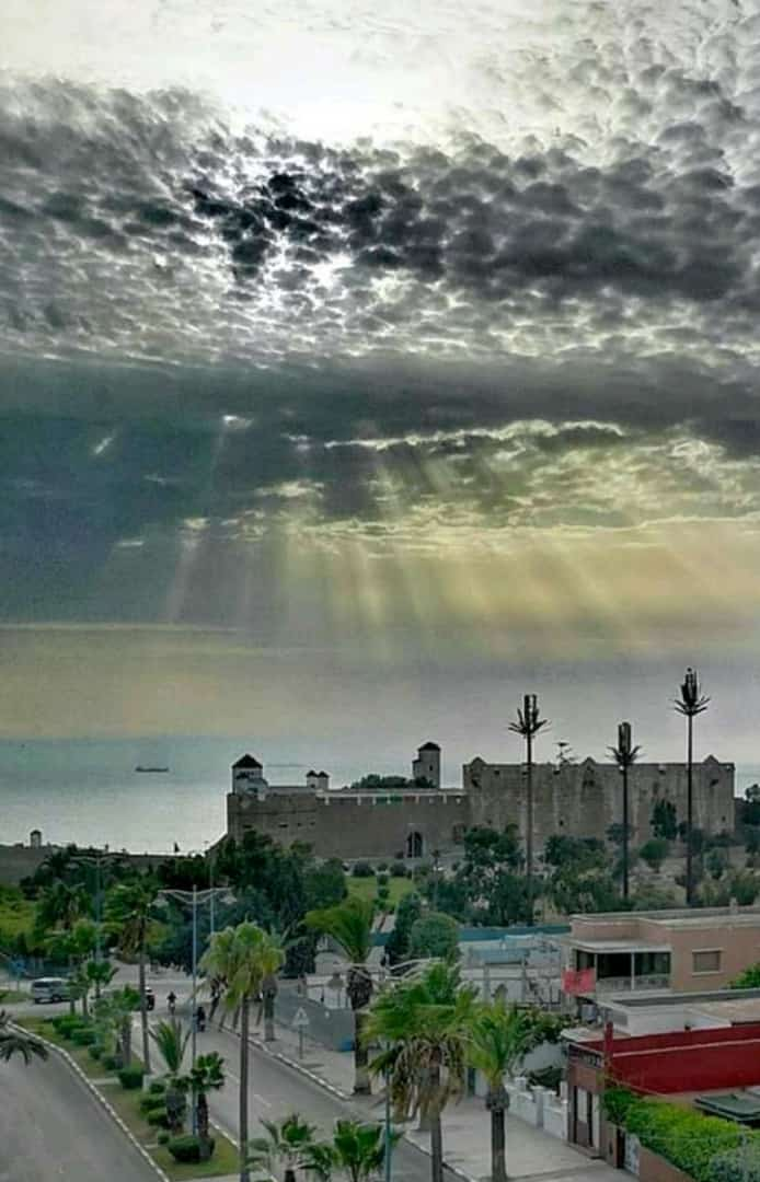 صورة جميلة لمدينة آسفي حاضرة المحيط...